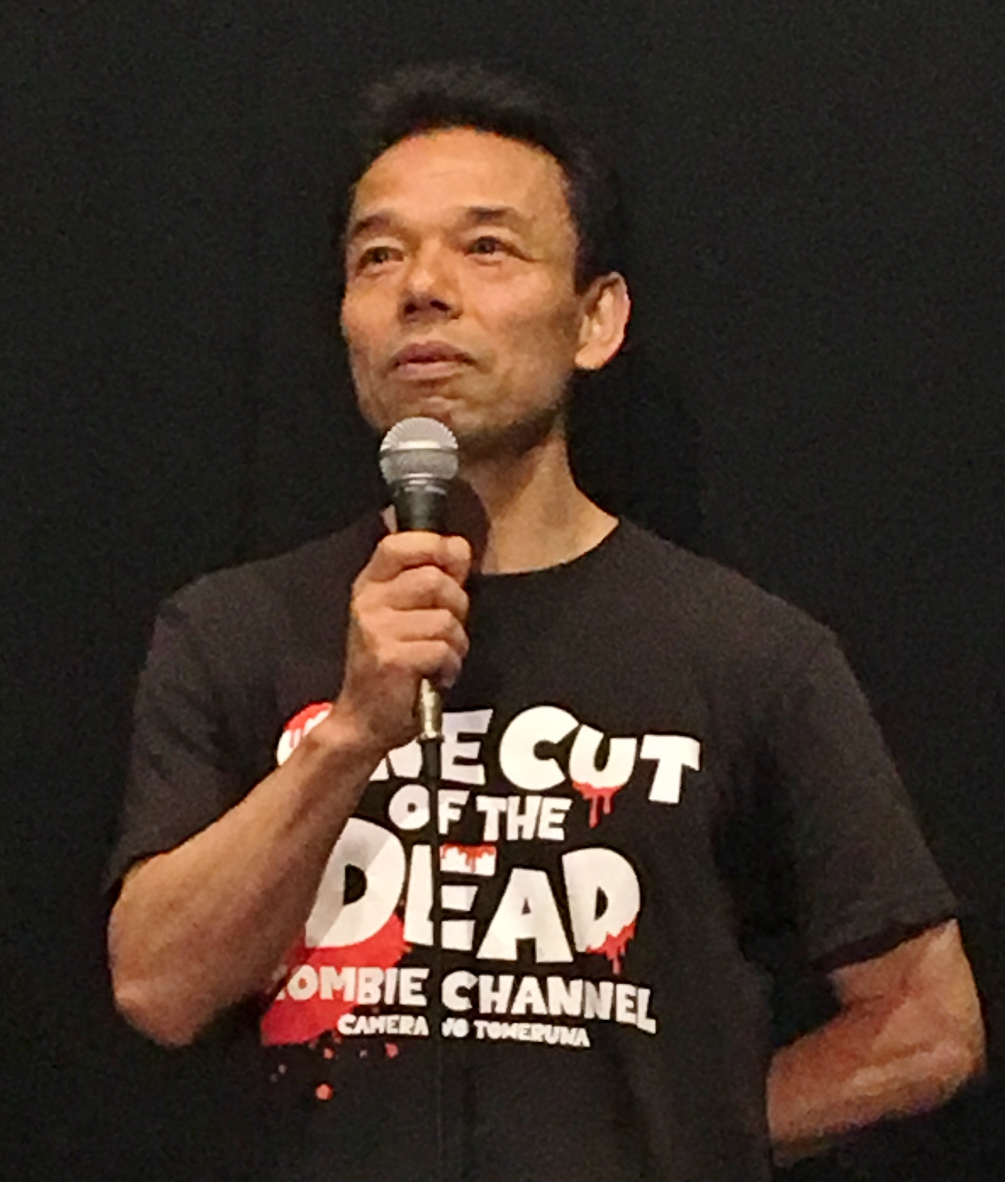 細井学（2018年7月14日、チネチッタ川崎）